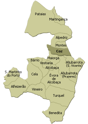 localisation de cos sur la freguesia de alcobaça